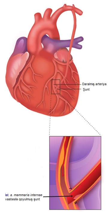 Tutulmuş (stenozlaşmış) tac damarın distal hissəsinə döş qəfəsinin daxili arteriyası (lat. a. mammaria internae) vasitəsilə şuntun qoyulması (sxematik)